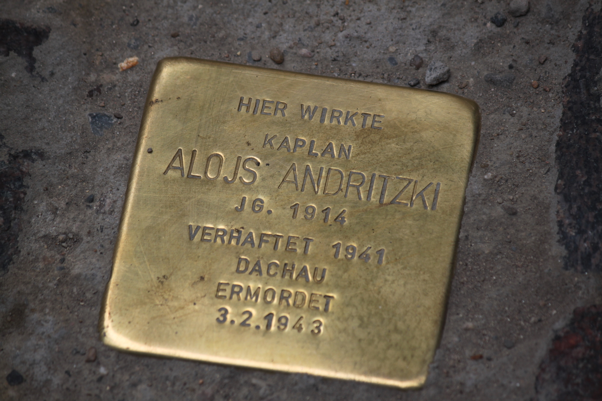 Der "Stolperstein" für Alois Andritzki vor der Dresdener Kathedrale. Hornjoserbsce: "Kopolak" za Alojsa Andrickeho před Drježdźanskej katedralu.